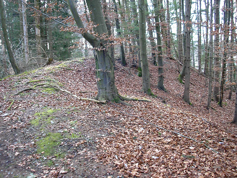 Sunderburg bei Schöngeising (Landkreis Fürstenfeldbruck, Oberbayern). Der Wall der Hauptburg nach Westen. Eigene Aufnahme, Jan. 2008 / Sunderburg castle near Schoengeising ( Landkreis Fuerstenfeldbruck, Upper Bavaria, Germany). The earthworks of the central castle, looking west. Own photo, Jan. 2008